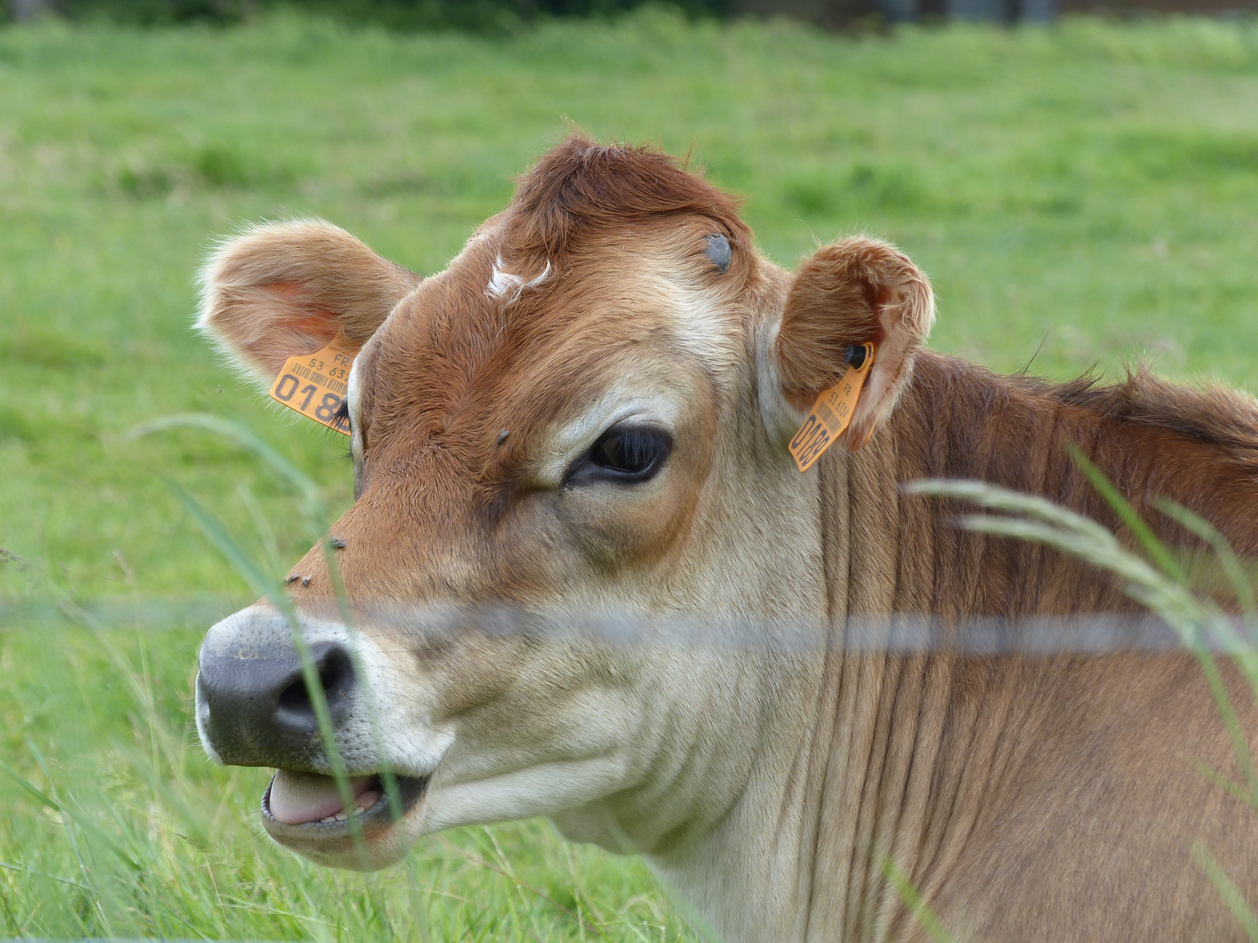 Une vache de race Jersiaise vue de 3/4 face